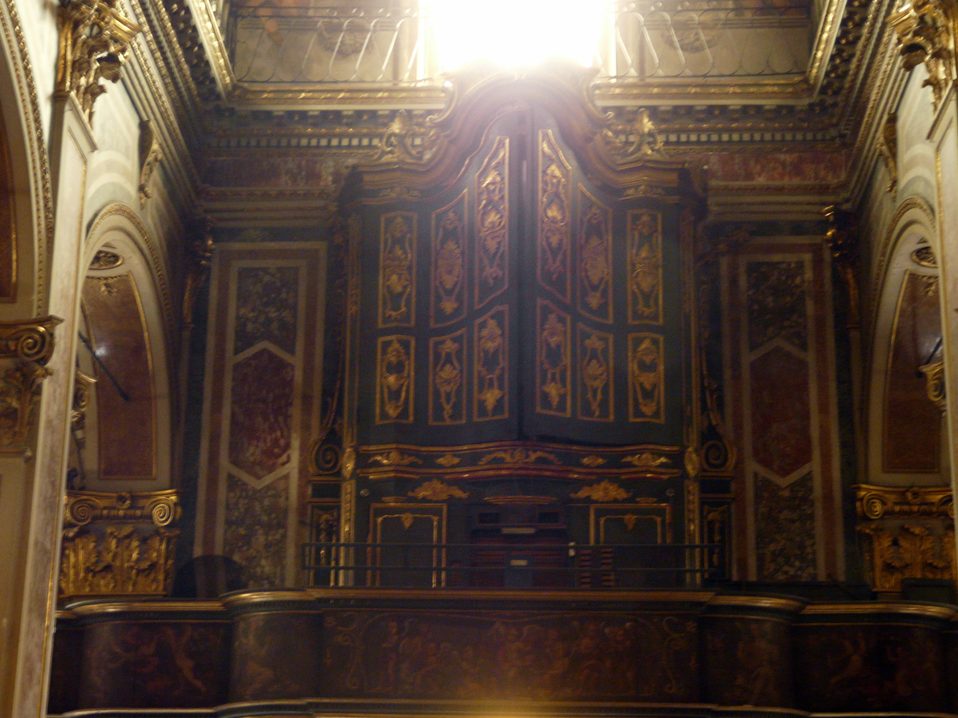 Cantoria e organo della chiesa di Nostra Signora della Concordia, Albissola Marina, Liguria, Italia